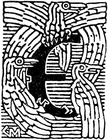 Gerhard Munthe: Illustration for Eiriksønnenes saga. Snorre 1899-edition. Initial (Eiriksønnene fikk kongedømme i Norge etter at Kong Håkon var falt.)